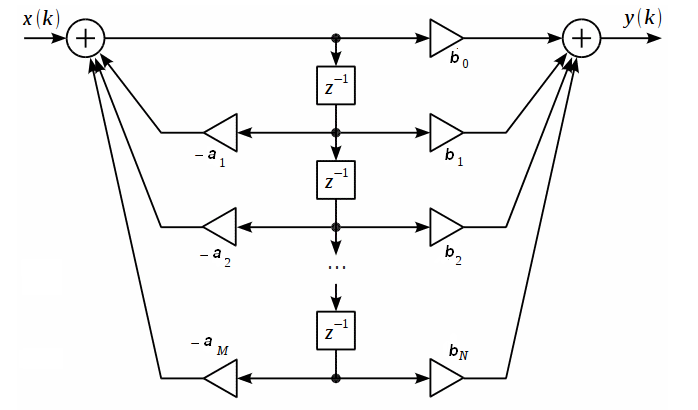 БИХ-фильтр каноническая форма